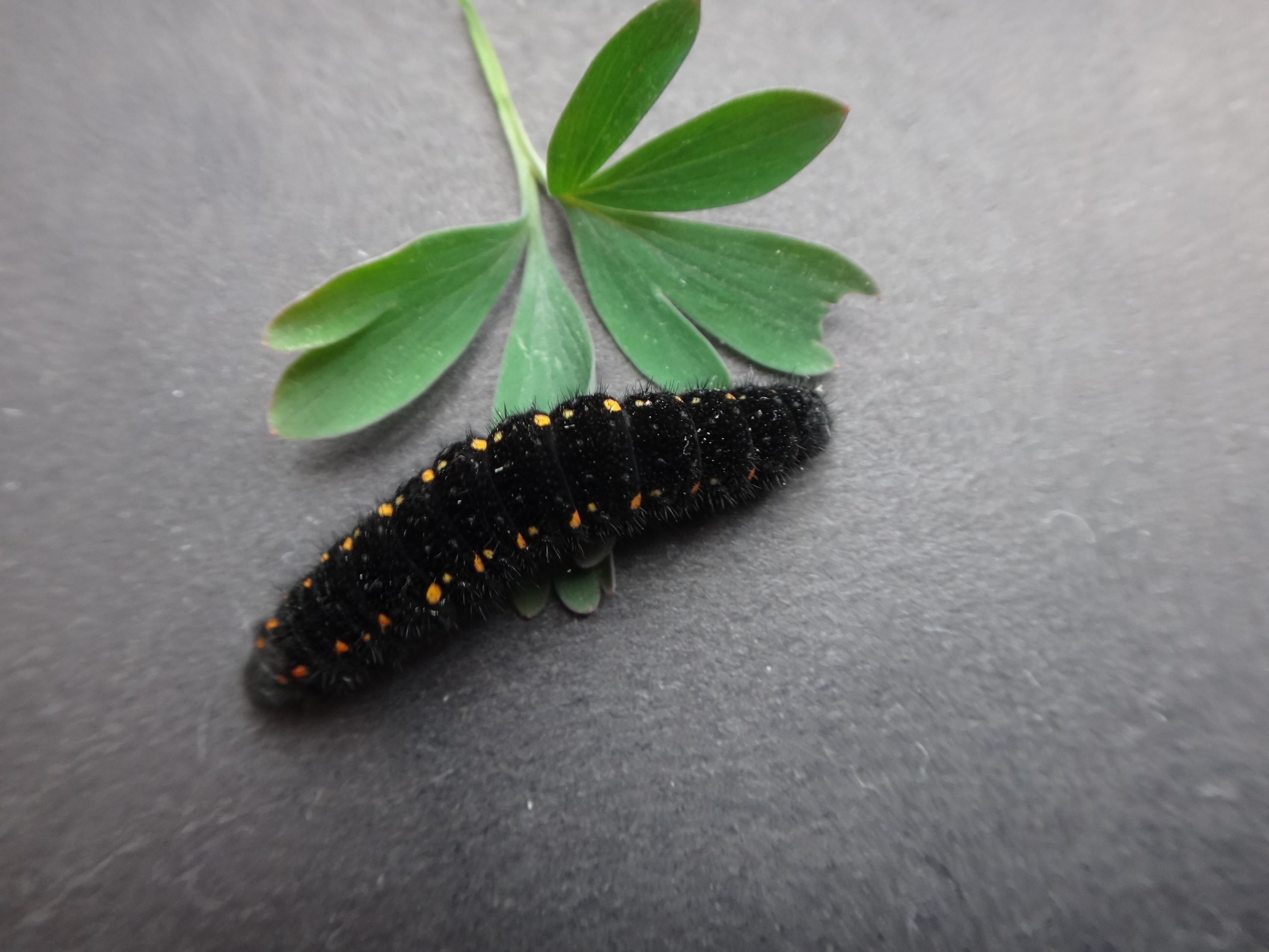 Driopa phoebus larvae